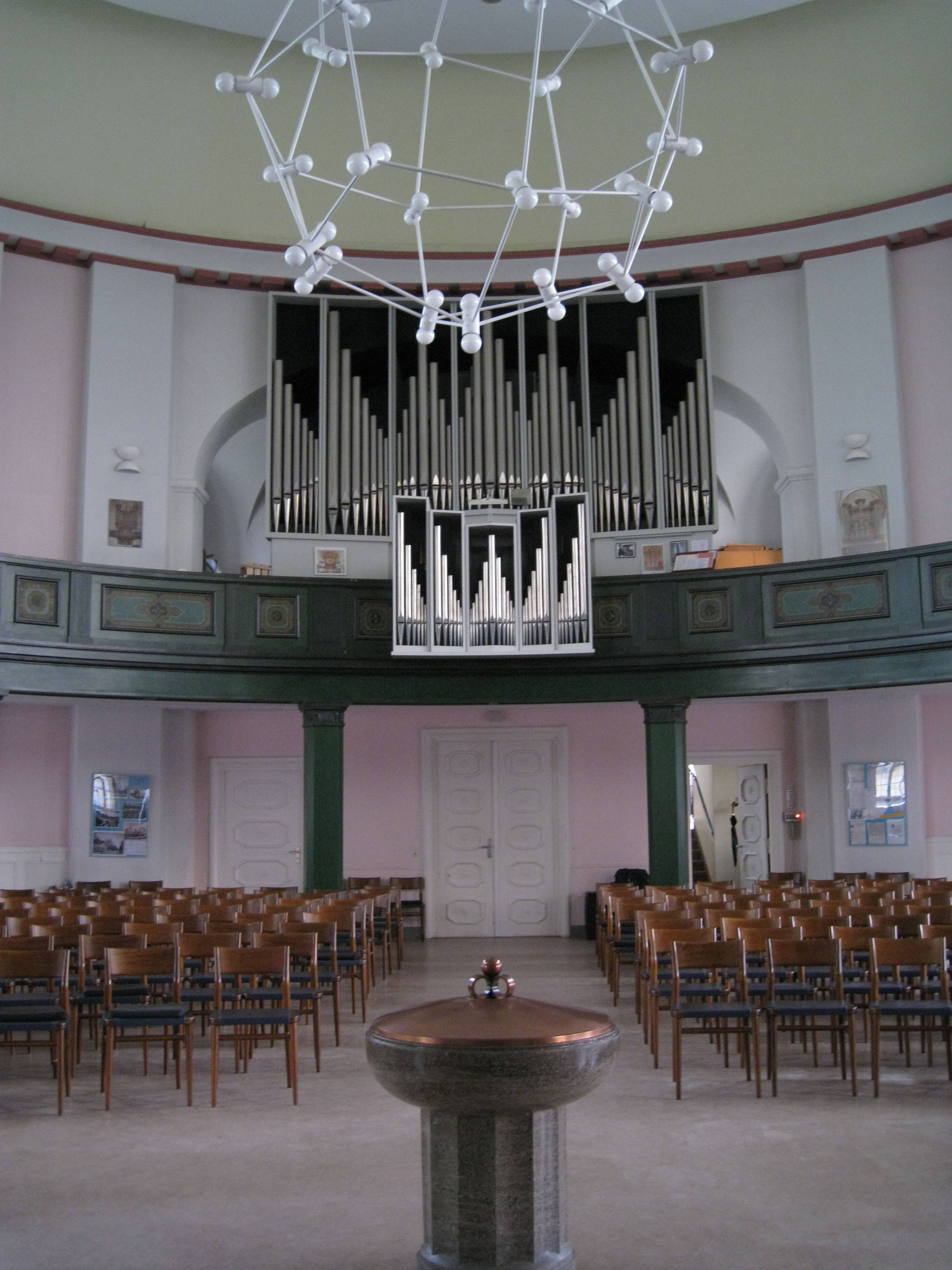 Blick auf die Orgel der Johanneskirche